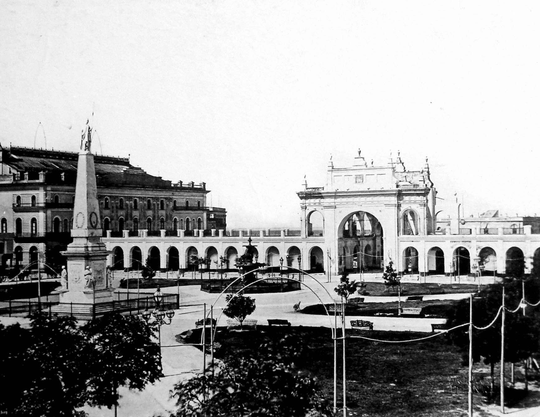 Recova, Plaza de la Victoria y antiguo Teatro Colón, Buenos Aires, 1875. Inventario 8. General Archive of the Nation Native nameArchivo General de la Nación ArgentinaLocationBuenos Aires, ArgentinaCoordinates34° 36′ 17″ S, 58° 22′ 14″ W Established28 August 1821Web pageAGNAuthority control : Q2860529 ISNI: 0000 0001 2375 5869 This file, was provided to Wikimedia Commonsthanks to an agreement between the General Archive of the Nation of Argentina and Wikimedia Argentina.